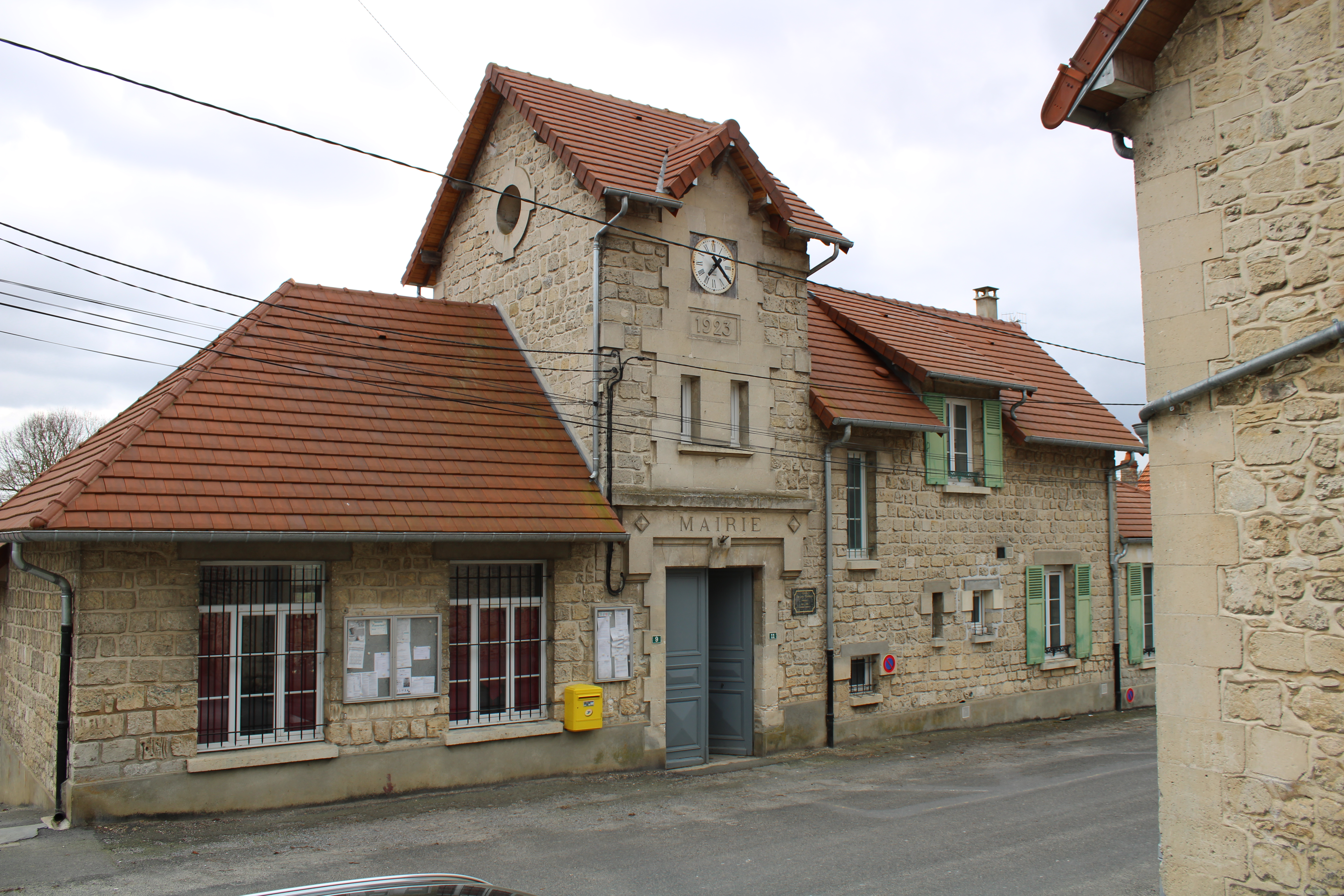 La mairie